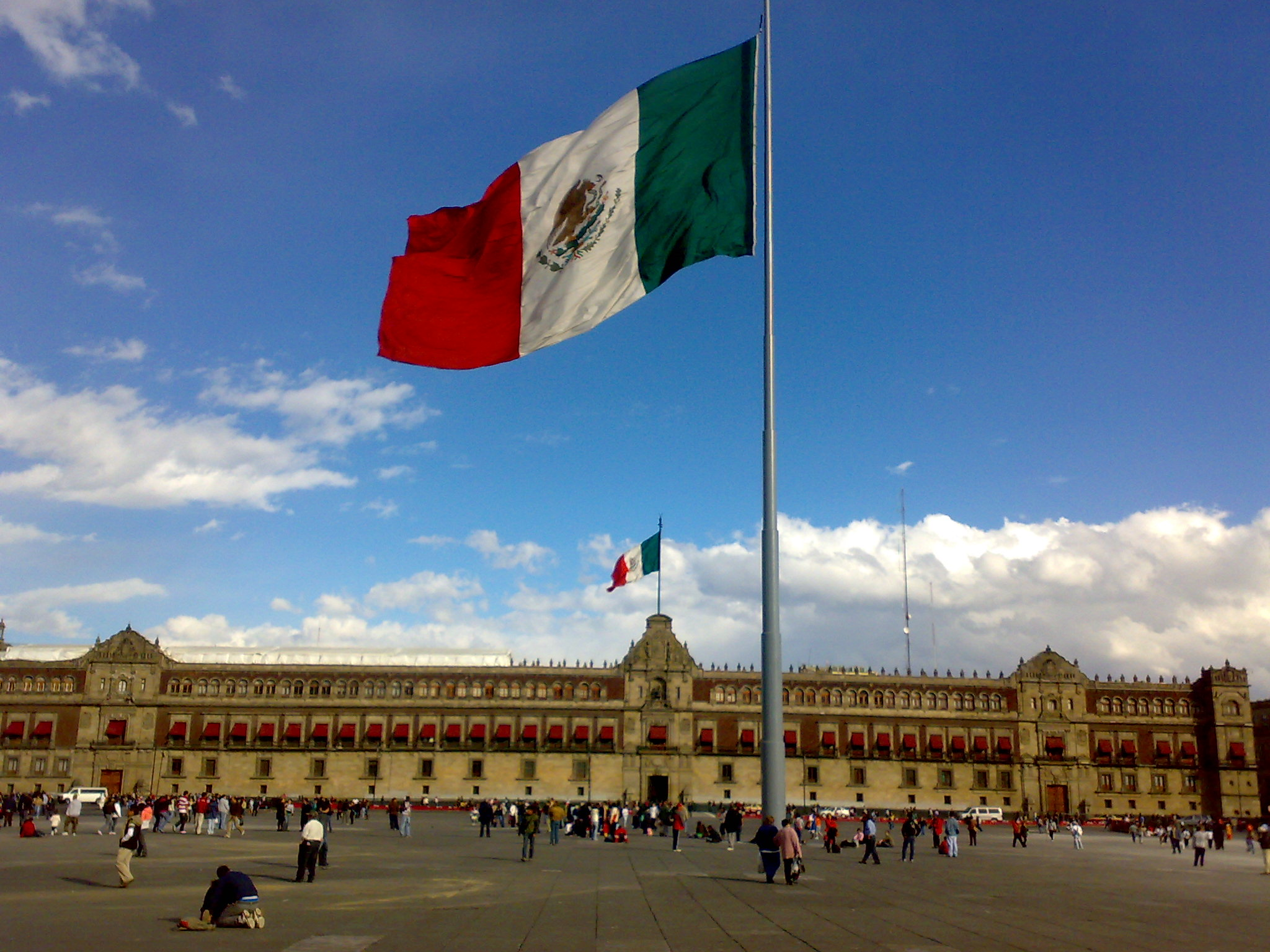 Bandera Mexicana